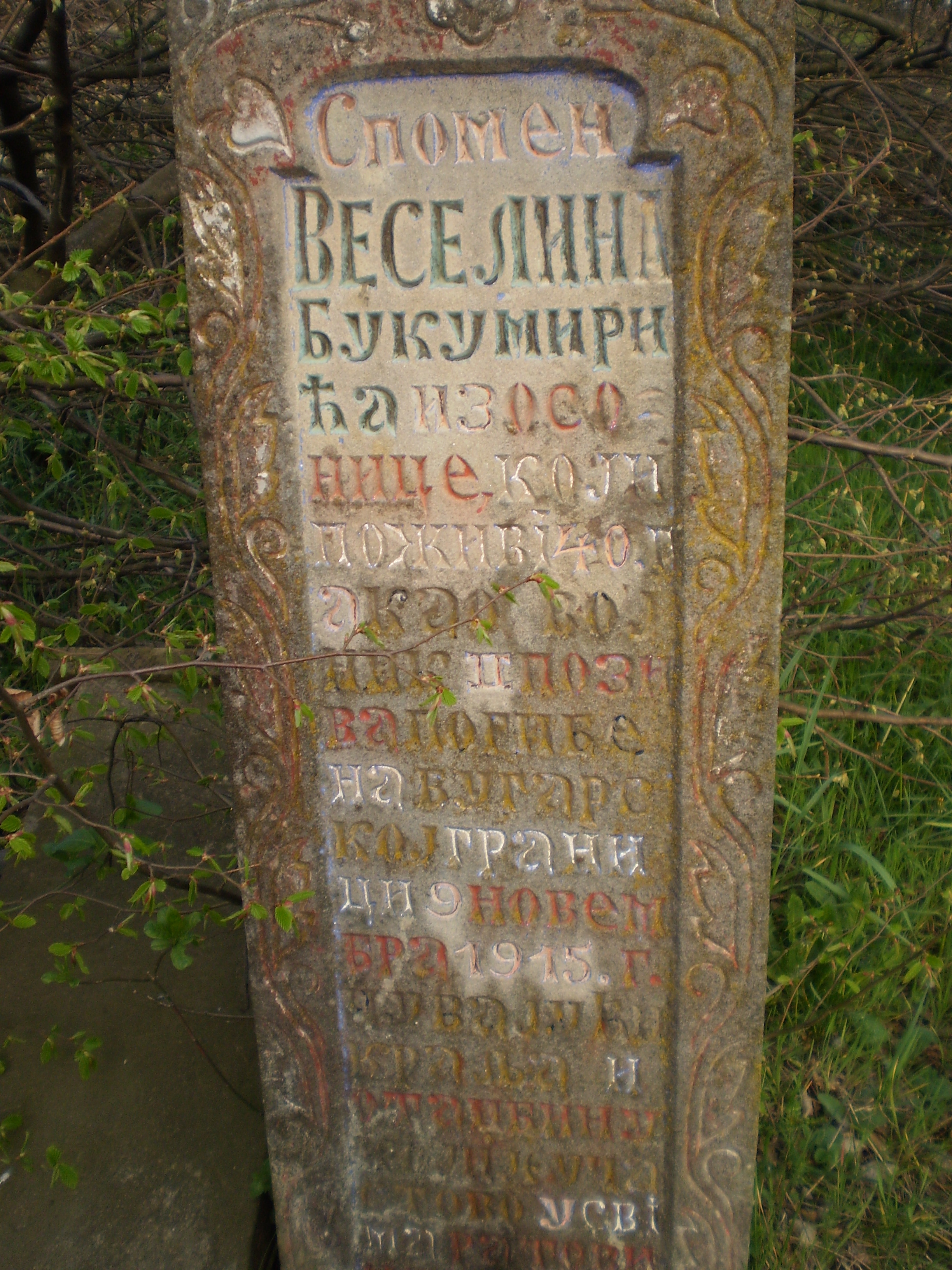 Српски (ћирилица): Споменик (Крајпуташ) Веселину Букимирићу, 1915. Селиште